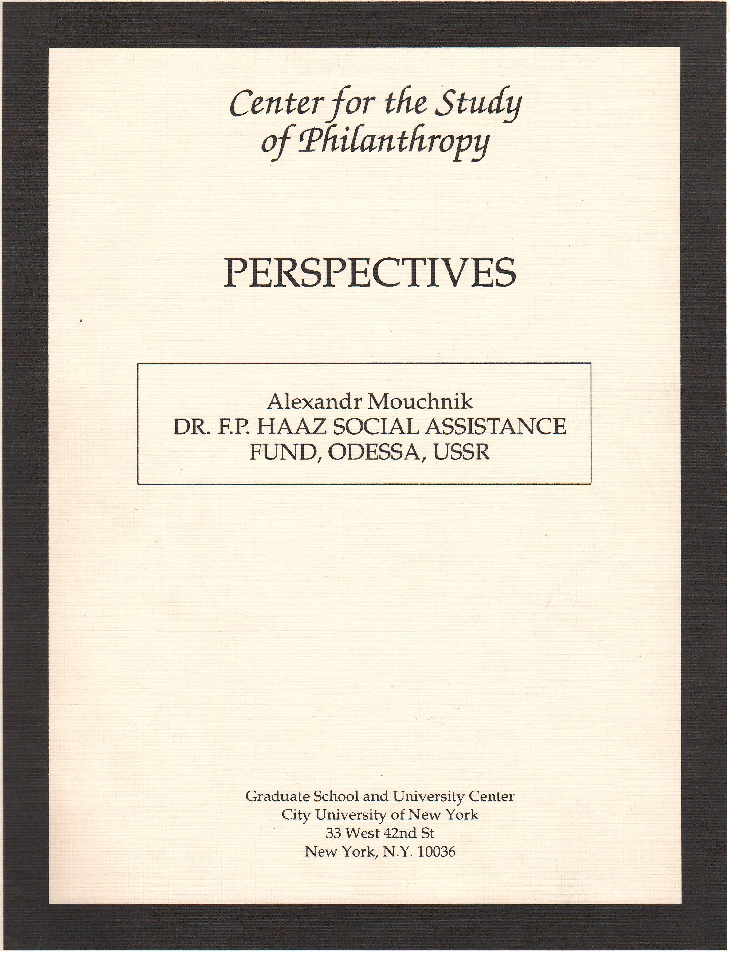 Русиньскый: Перспективы 1